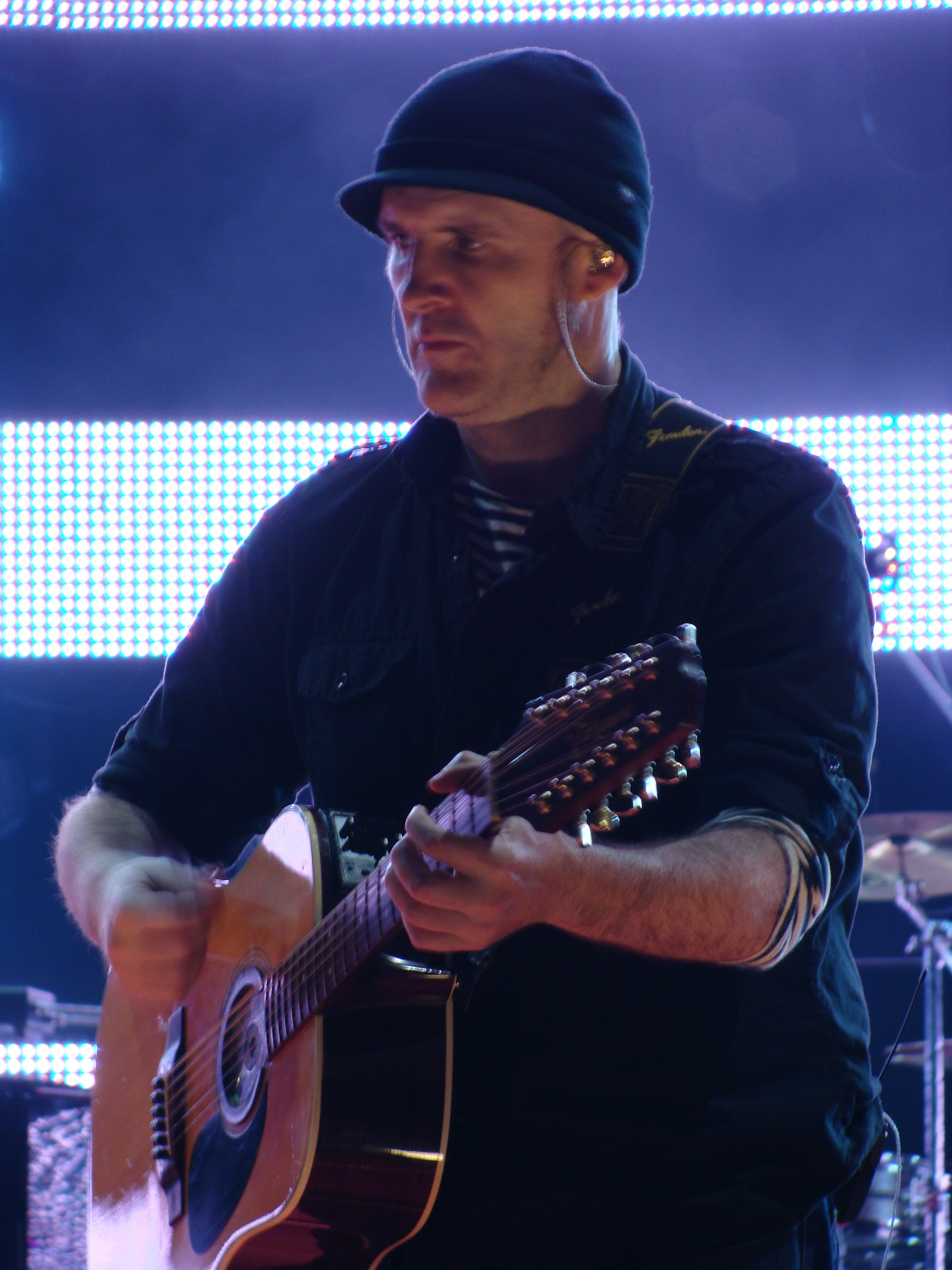 Juan Aguirre (Amaral)